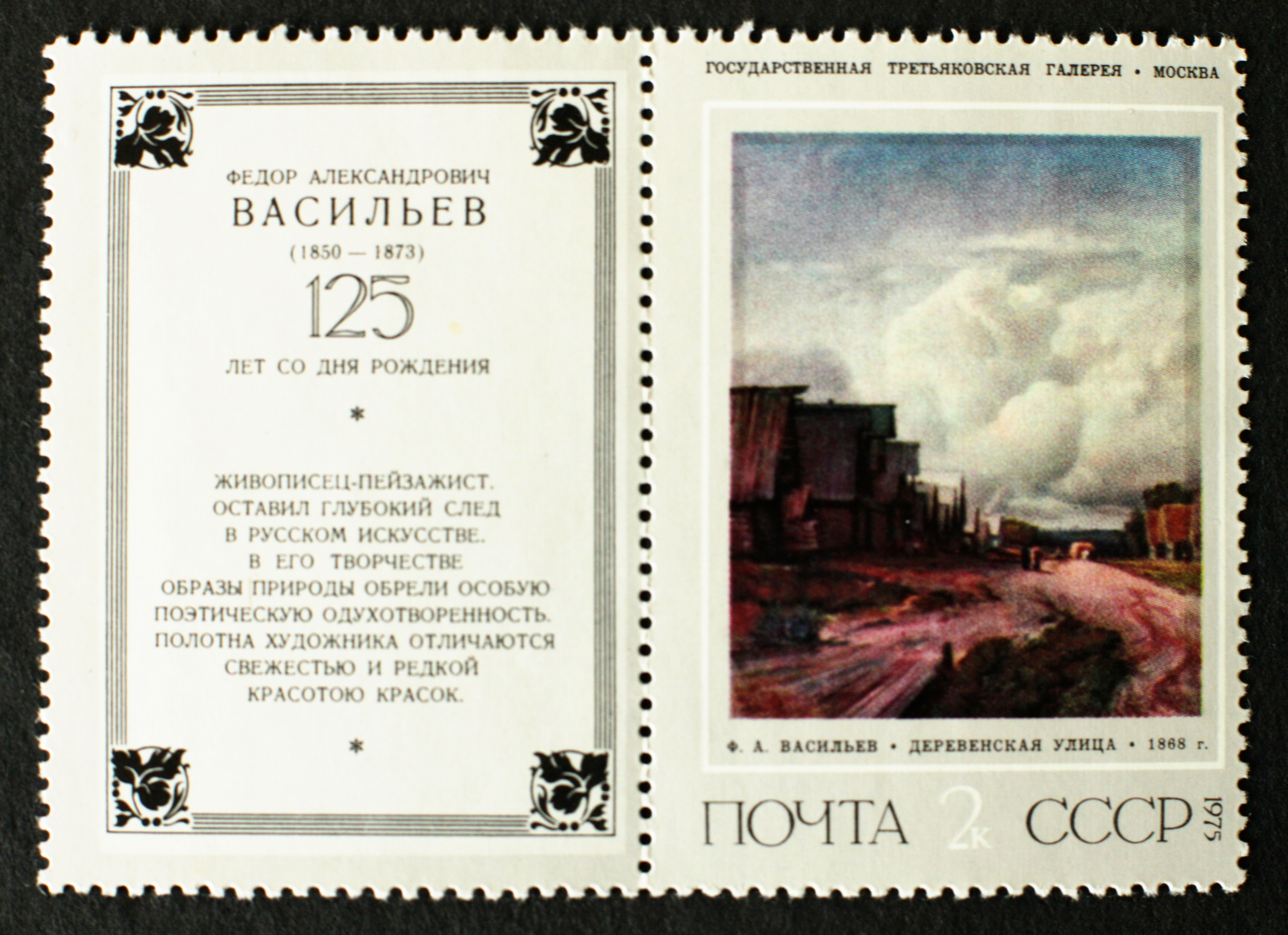 Briefmarke, Sowjetunion